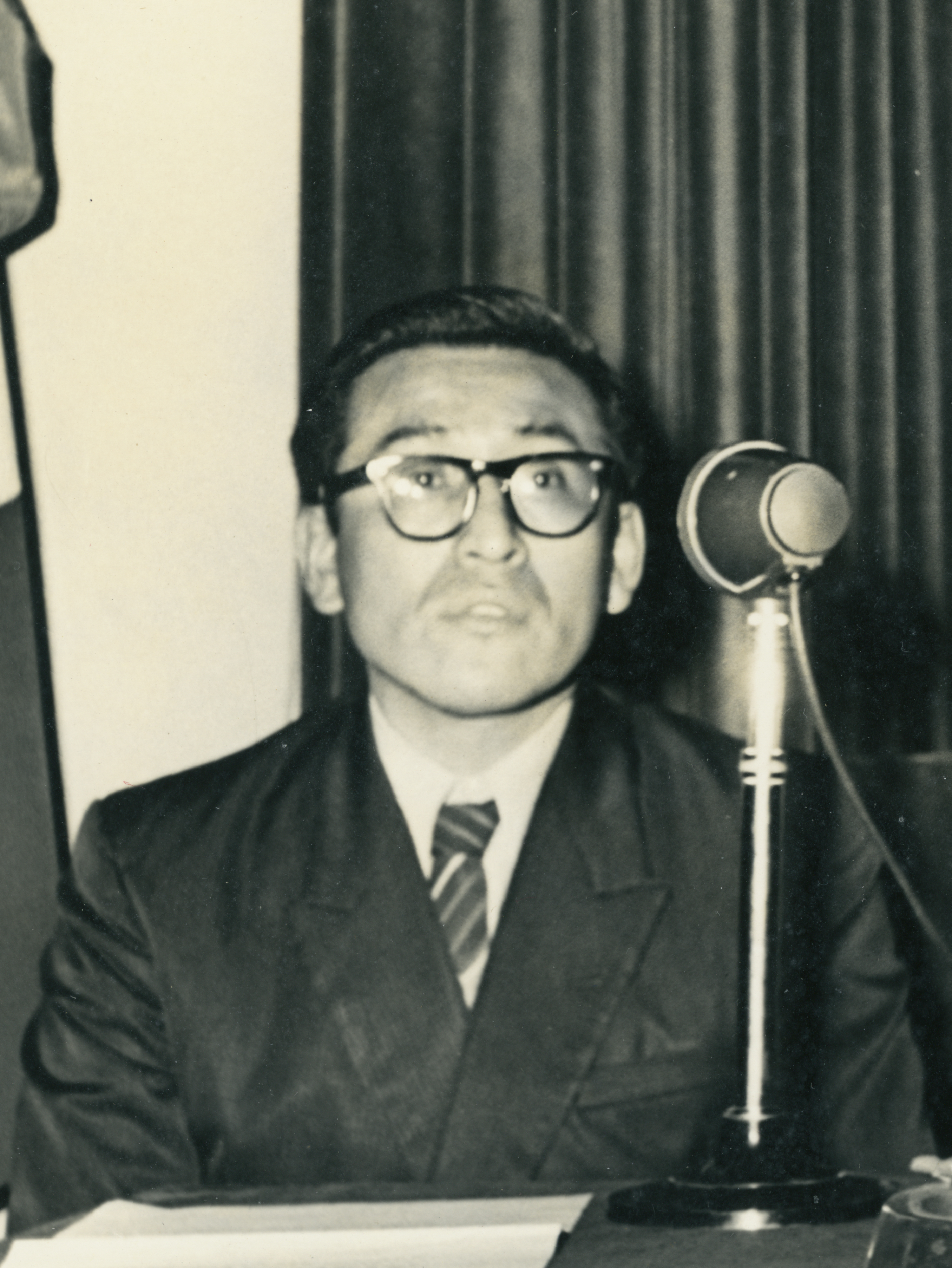 César Lévano, Antonio Melis y José Miguel Oviedo. Tomada durante la presentación de "Tres Ensayos sobre Mariátegui".